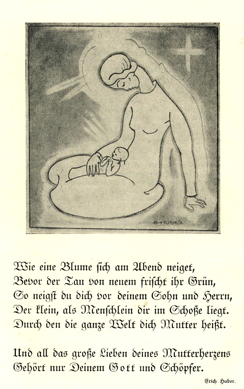 Illustration (mit begleitendem Text) in der "Neue Jugend" Jg. 19, 1937, Heft 3, S. 52